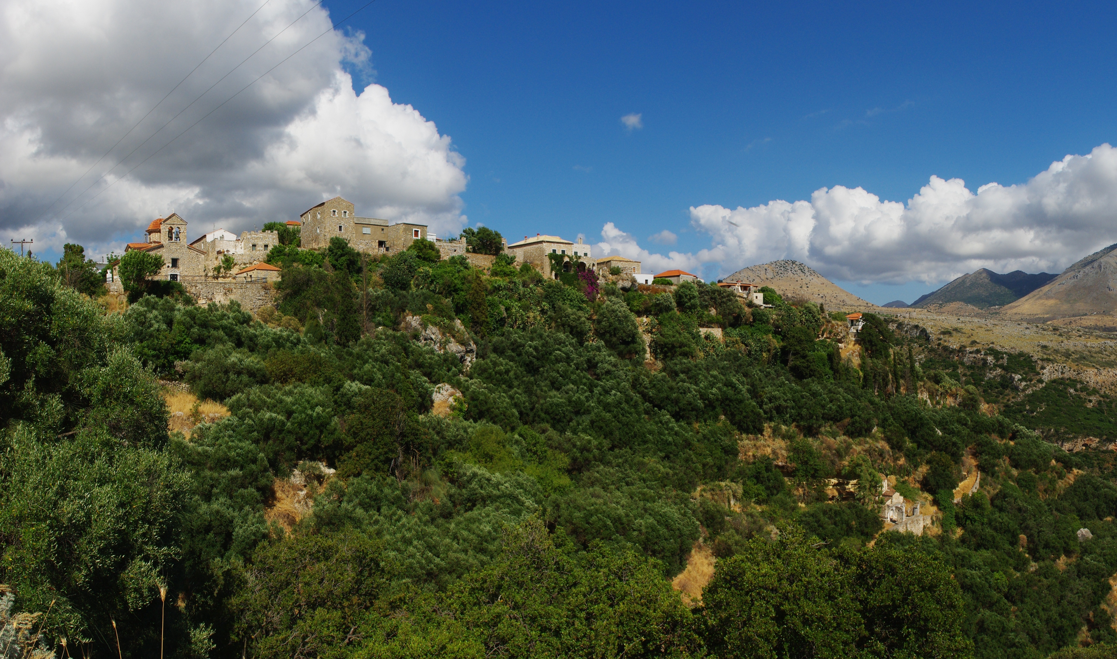 Itylo, Peloponnes, fotografiert von der Straße zur Limeni-Bucht